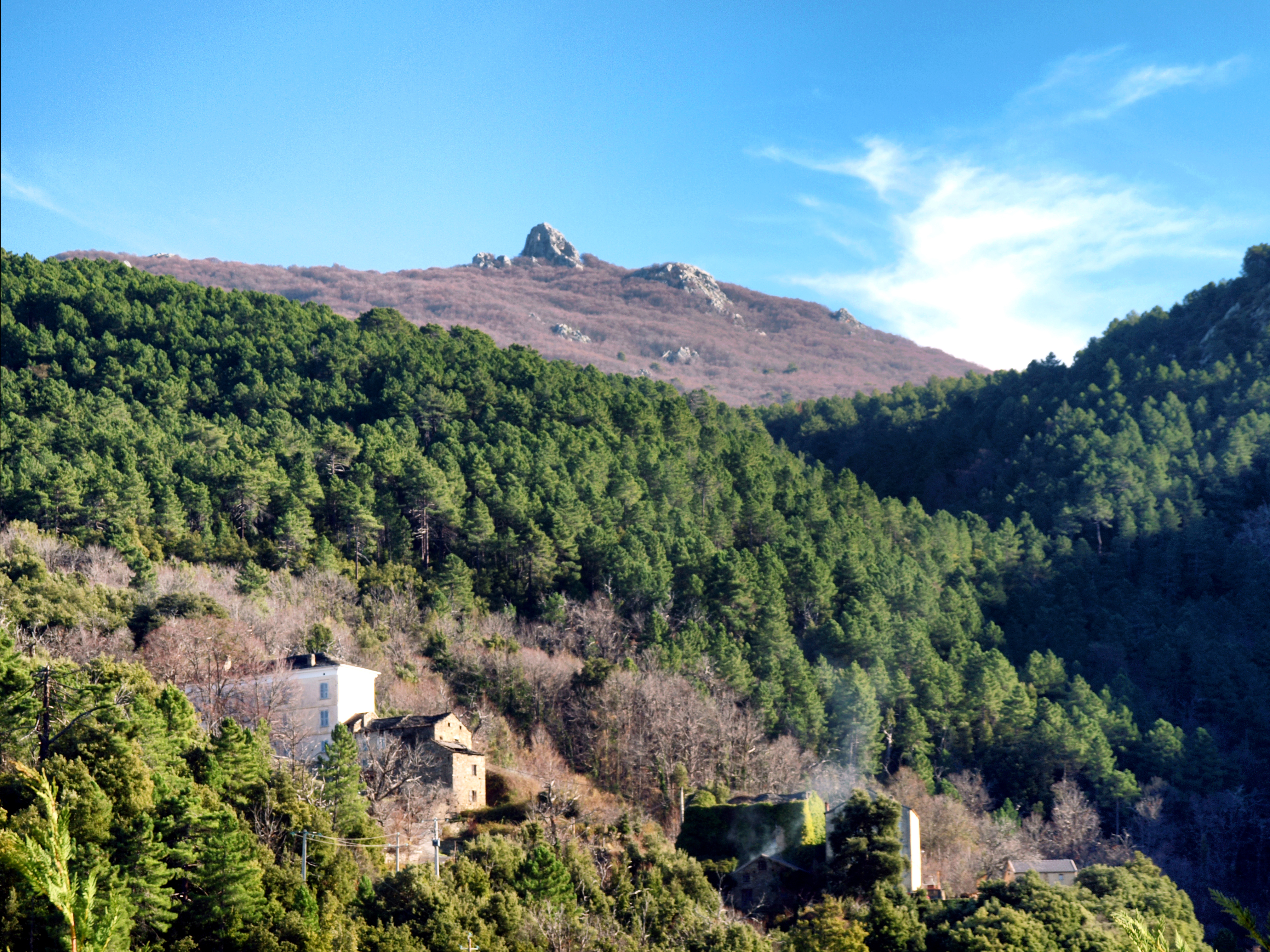 Gavignano, Castagniccia (Haute-Corse) - Le hameau de Petragrossa. À l'arrière-plan, dans l'axe du vallon du ruisseau de Paiarello, la forêt (partie nord) de San Pietro d'Accia, une hêtraie dominée par le monte San Petrone.